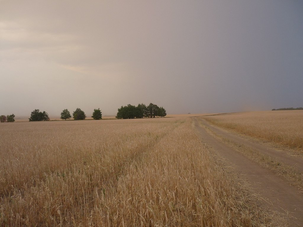 Татарча/tatarça: Иген кыры.